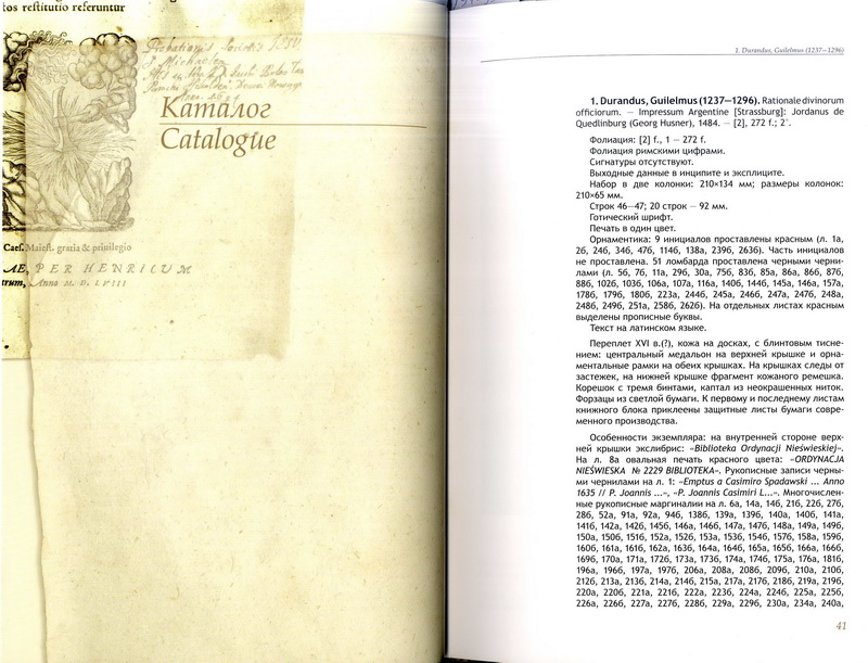 Знешні выгляд друкаванага каталога